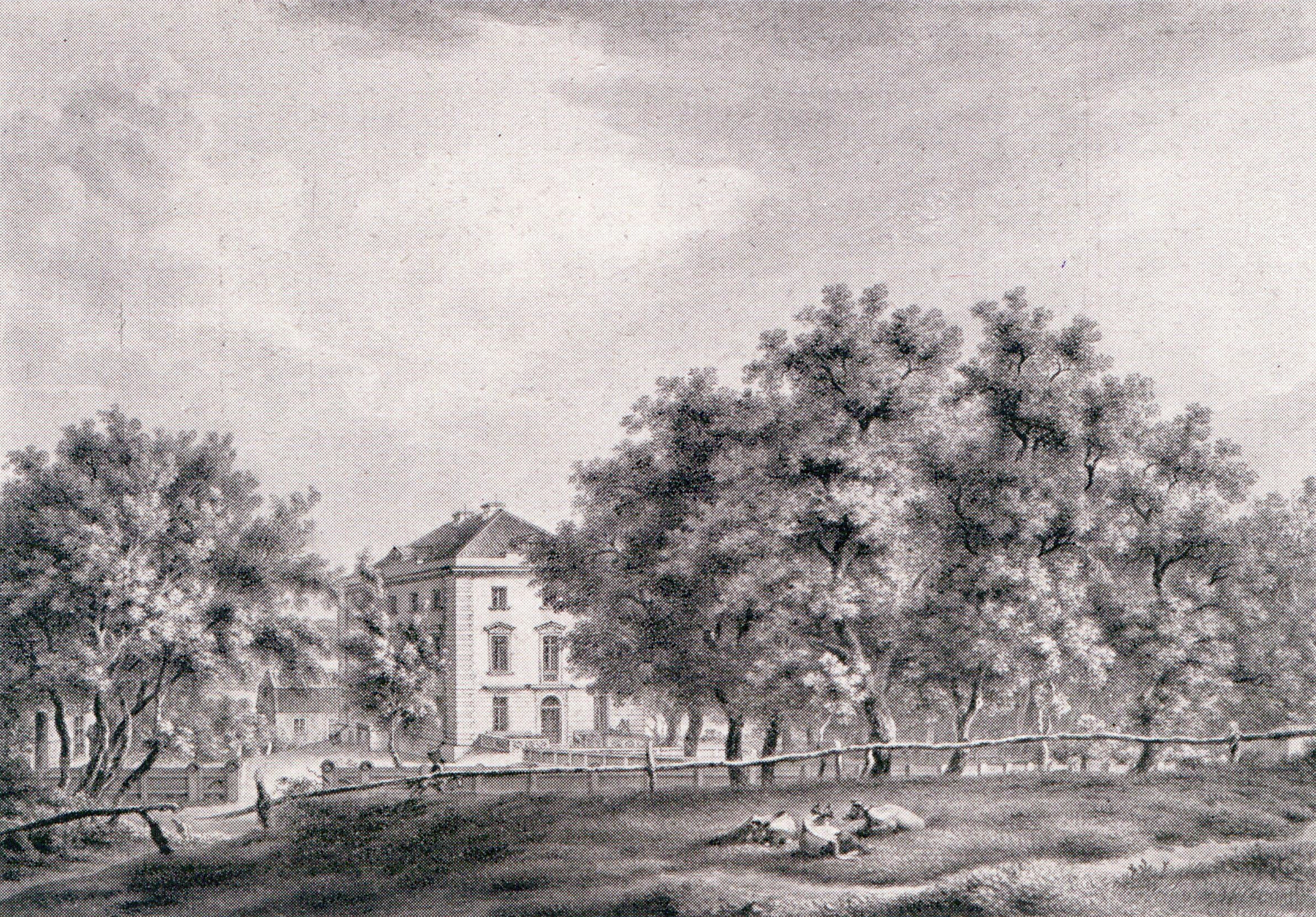 Klosterwirtshaus in Hamburg Harvestehude 1820